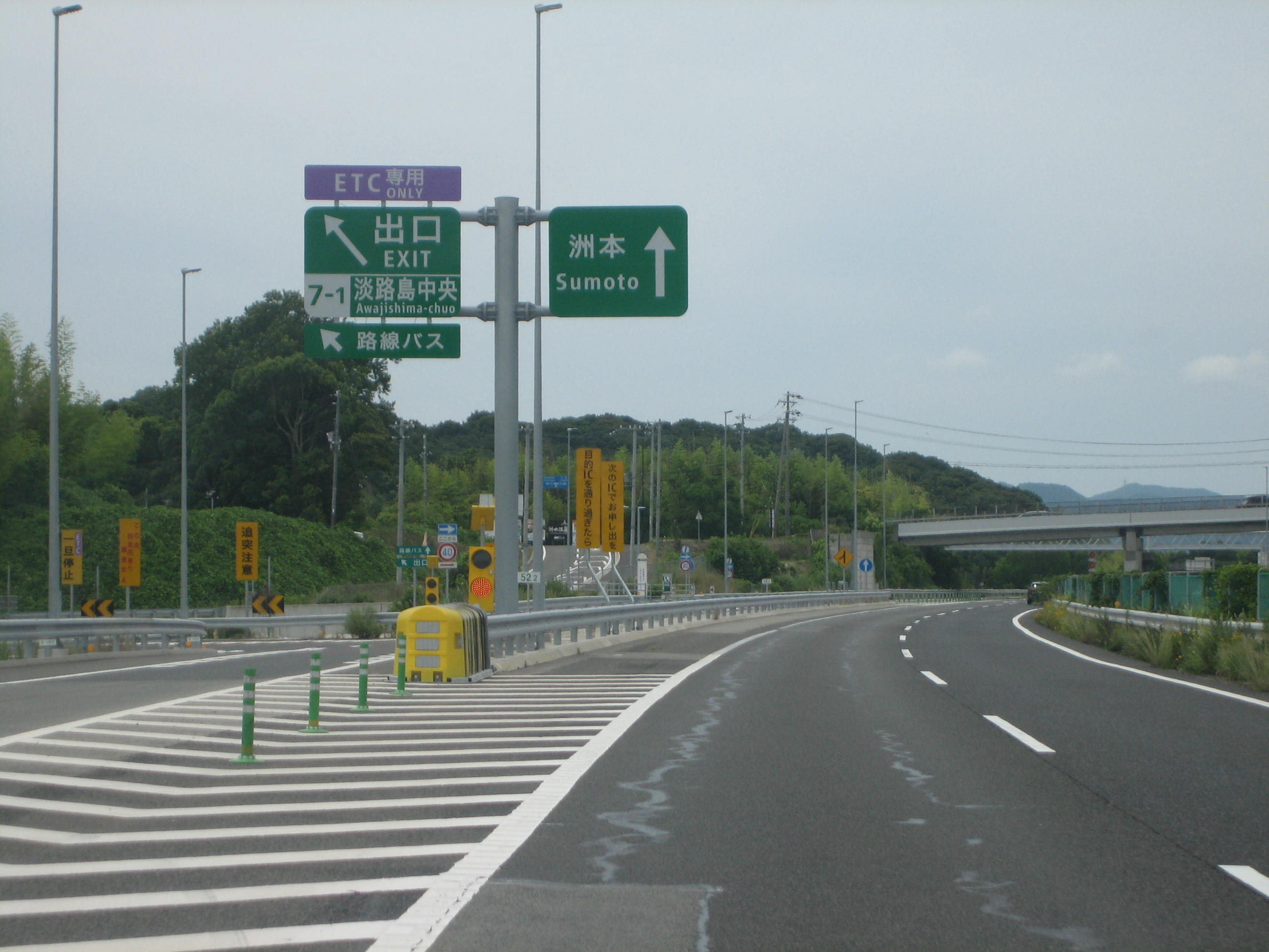 神戸淡路鳴門自動車道 淡路島中央SIC